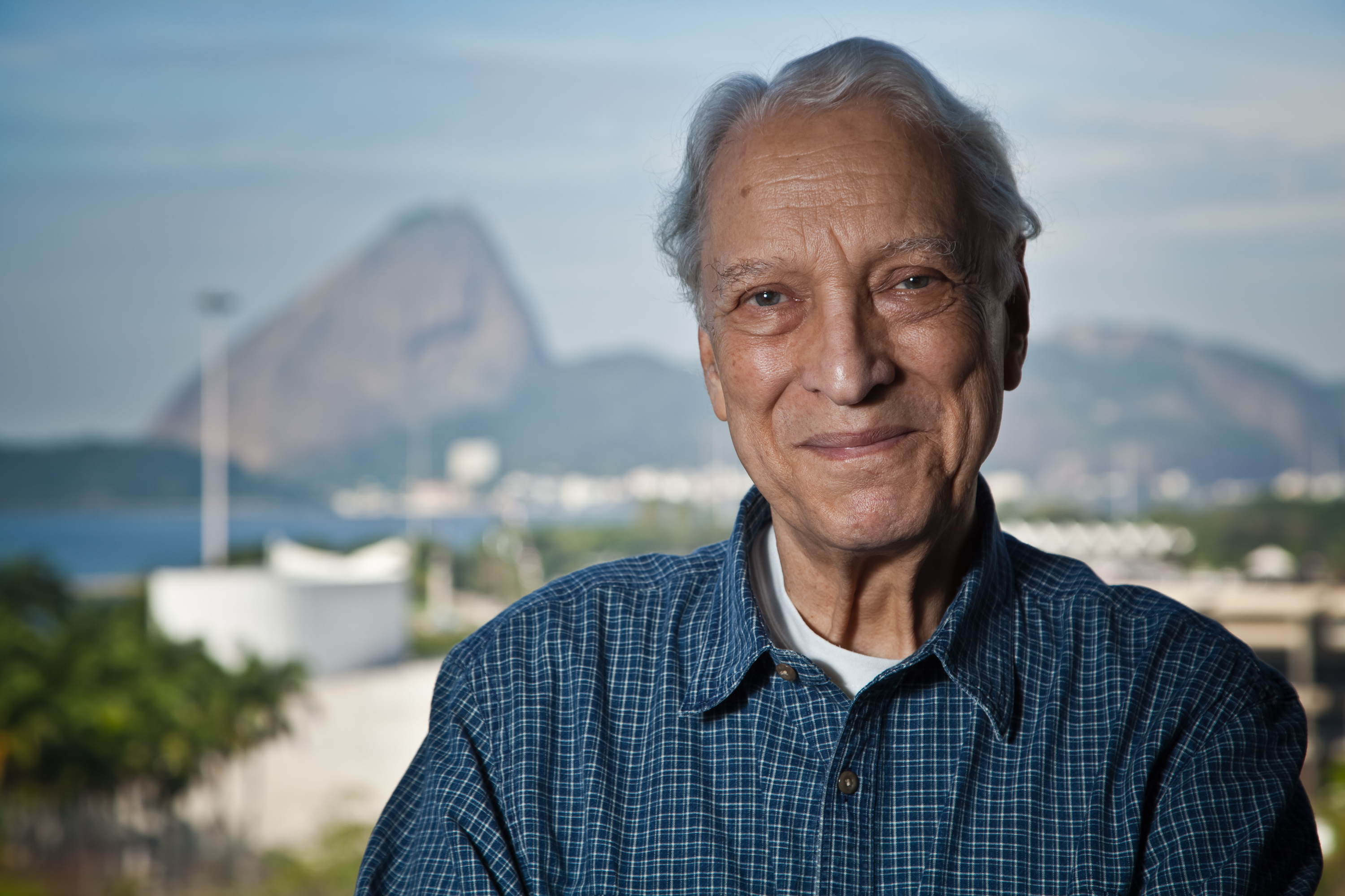 Luiz Alfredo Garcia-Roza com o Rio de Janeiro ao Fundo. Fotografia de 2012.